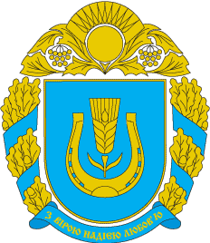 Герб Долинського району Кіровоградської області